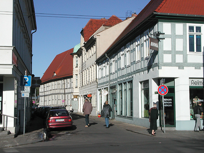 Eberswalde, An der Friedensbrücke 5